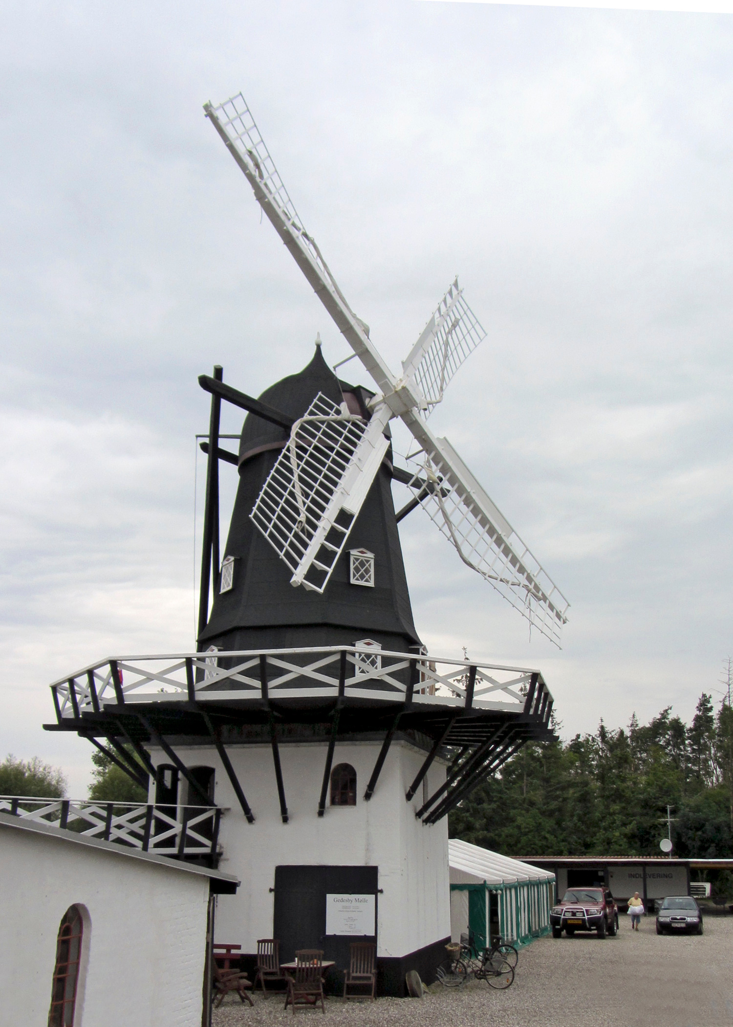 Gedesby Mølle